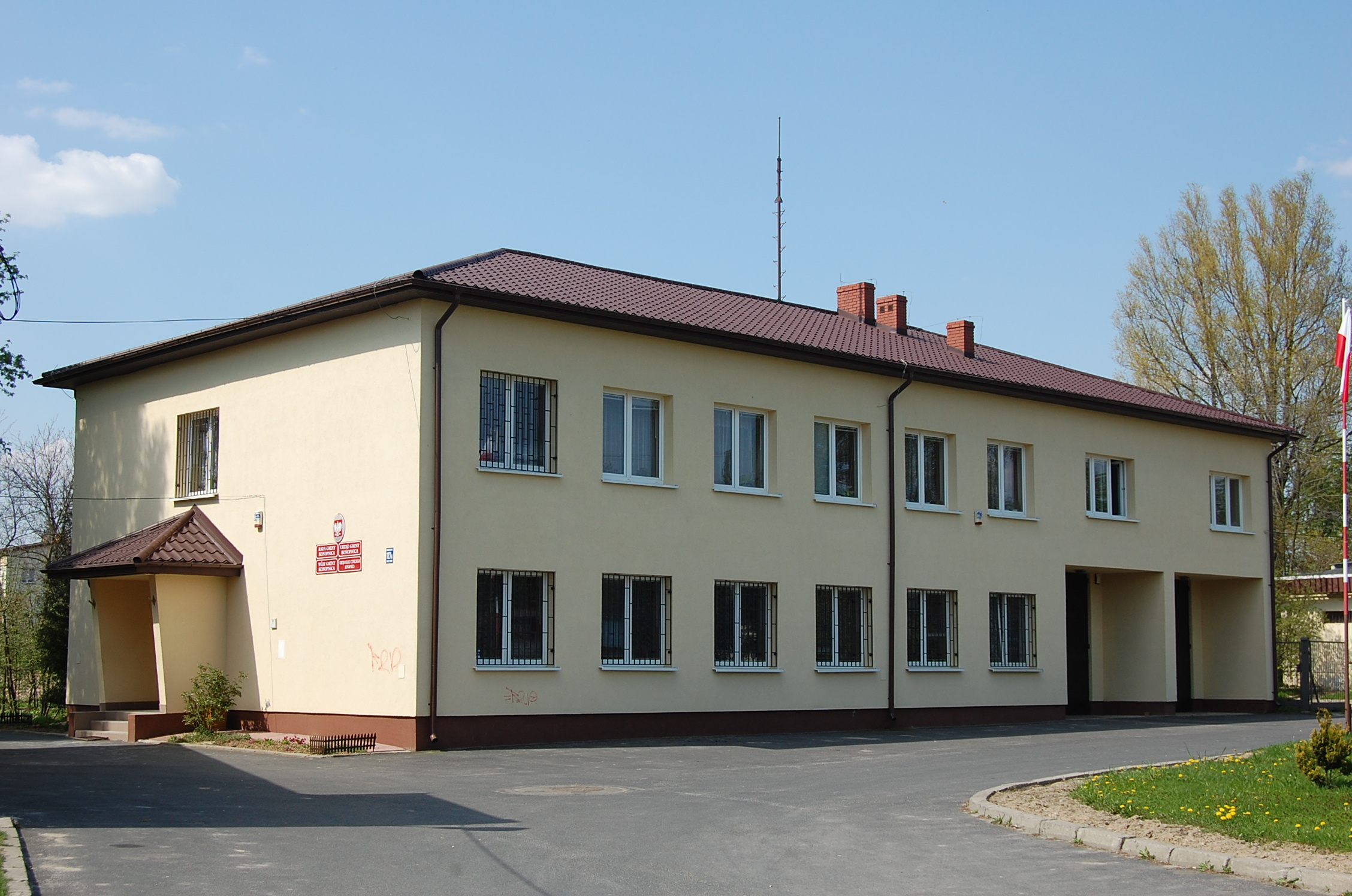 Kozubszczyzna - budynek Urzędu Gminy Konopnica